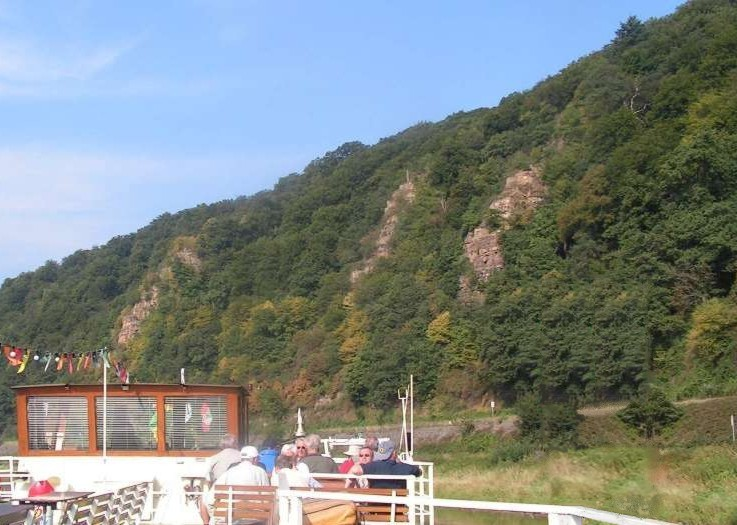 Hannoversche Klippen im Oktober 2005 von einem Weserschiff aus aufgenommen